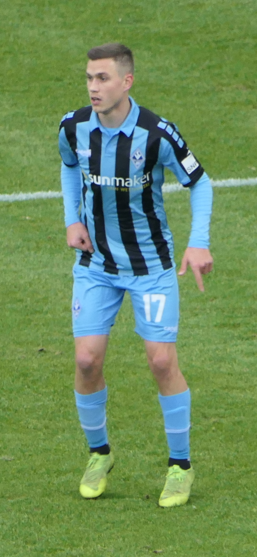 Der Fussballprofi Gianluca Korte im Trikot vom SV Waldhof Mannheim beim Heimspiel gegen Eintracht Braunschweig am 08.12.2019.